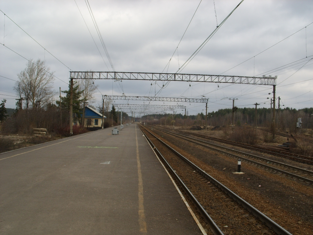 Станция Мюллюпельто. Вид на север